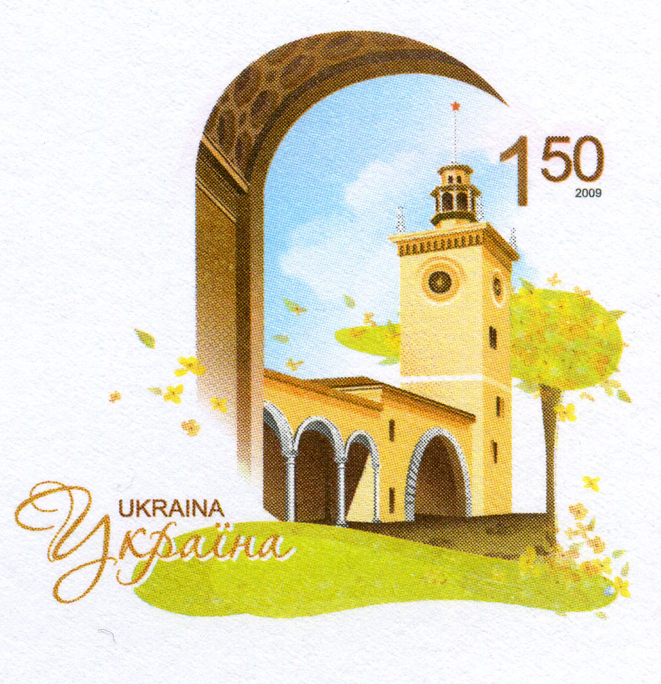 2009. Оригинальная марка Украины. Симферополь